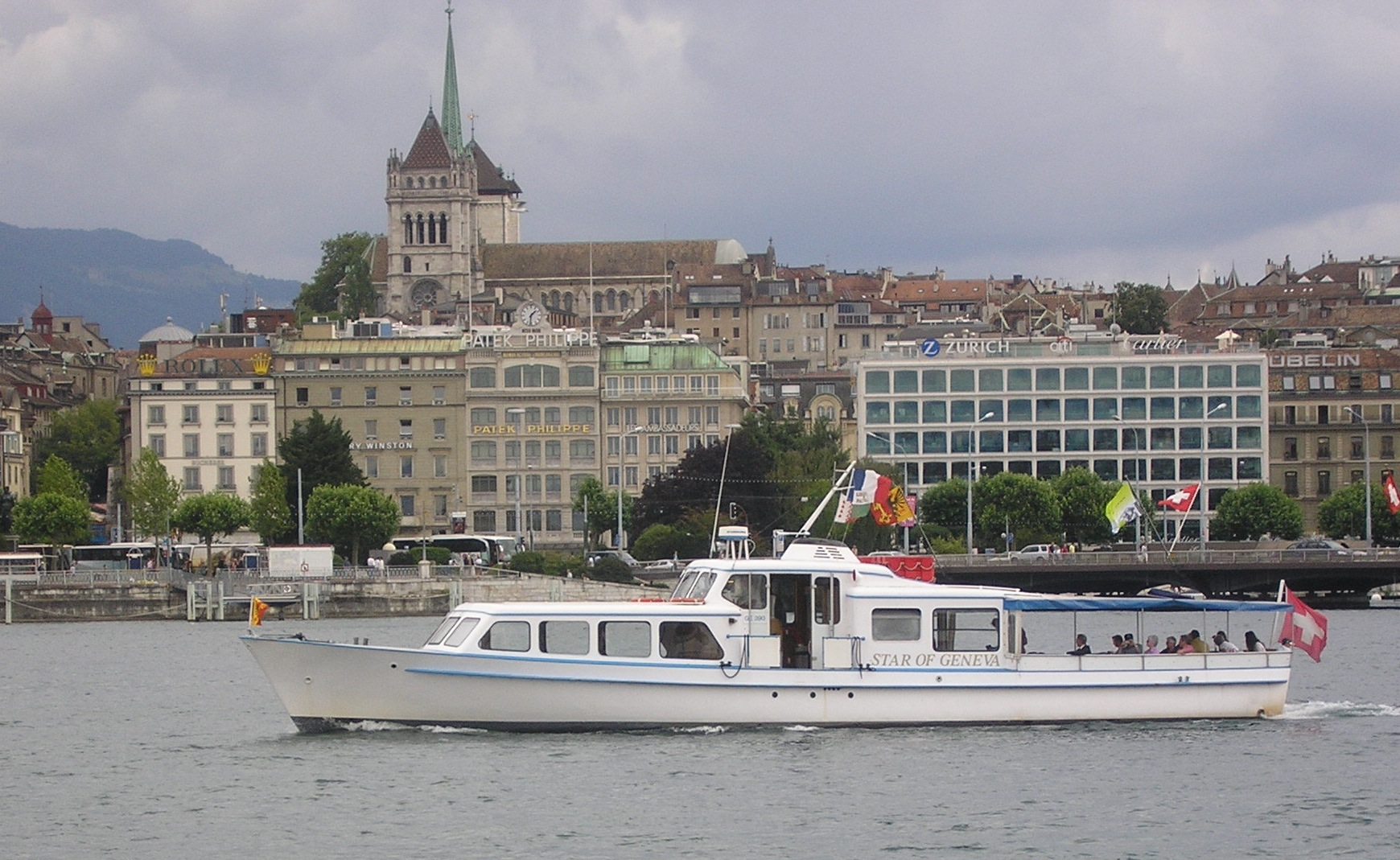 « Star of Geneva », bateau de la compagnie « Swissboat », à Genève.